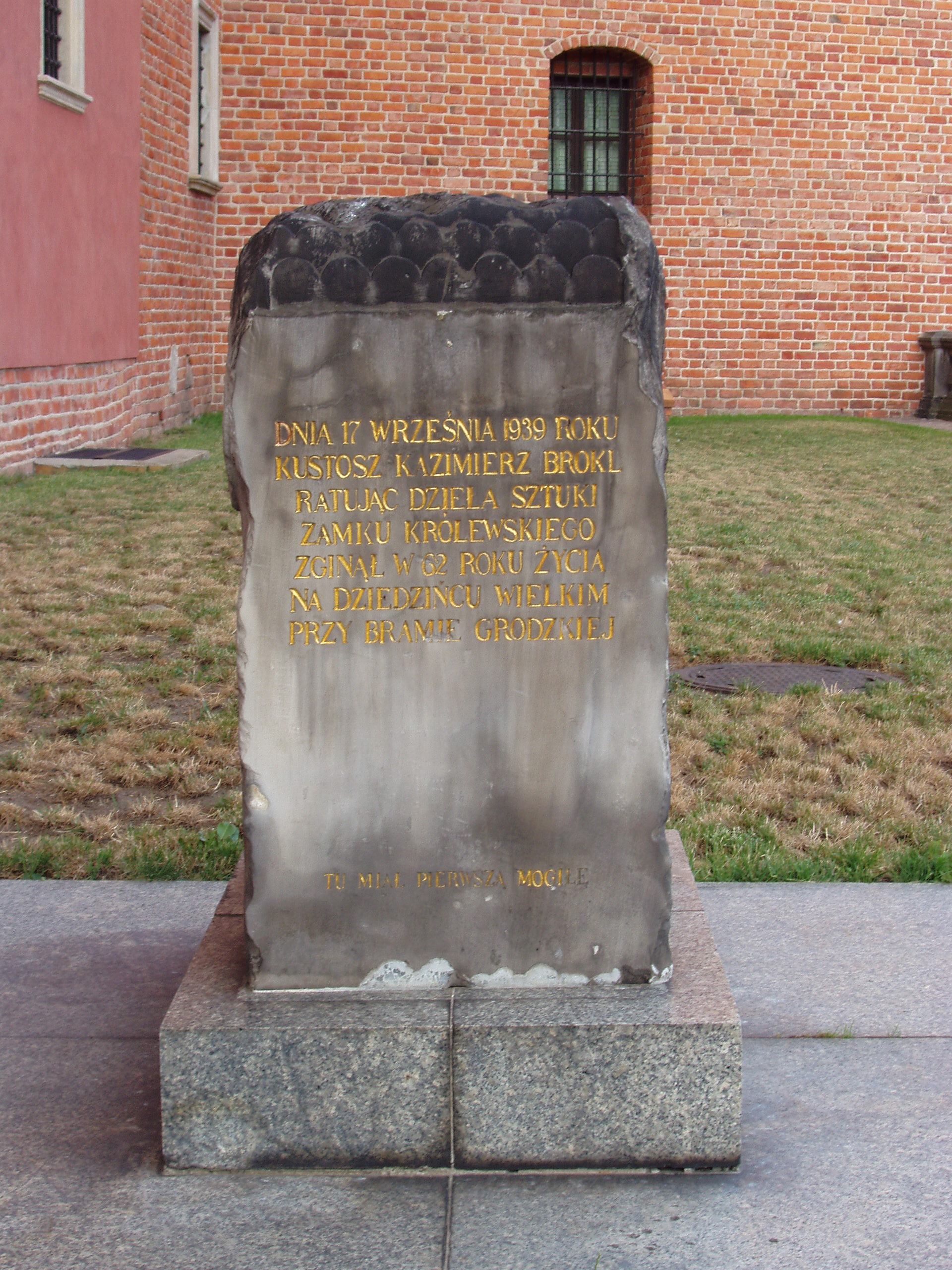 Kamień pamiątkowy w rejonie Zamku Królewskiego w Warszawie.